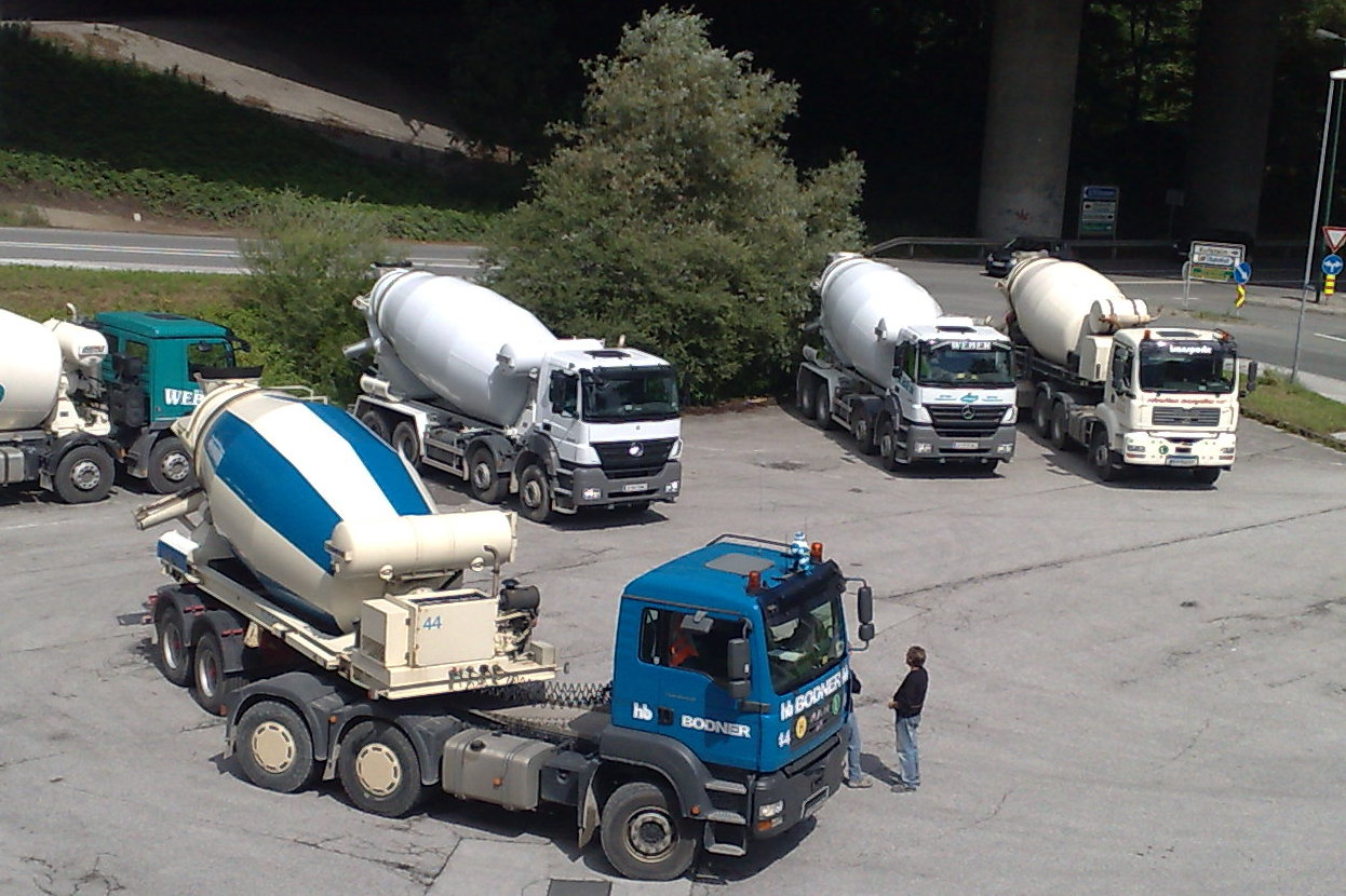 Betonmischfahrzeuge